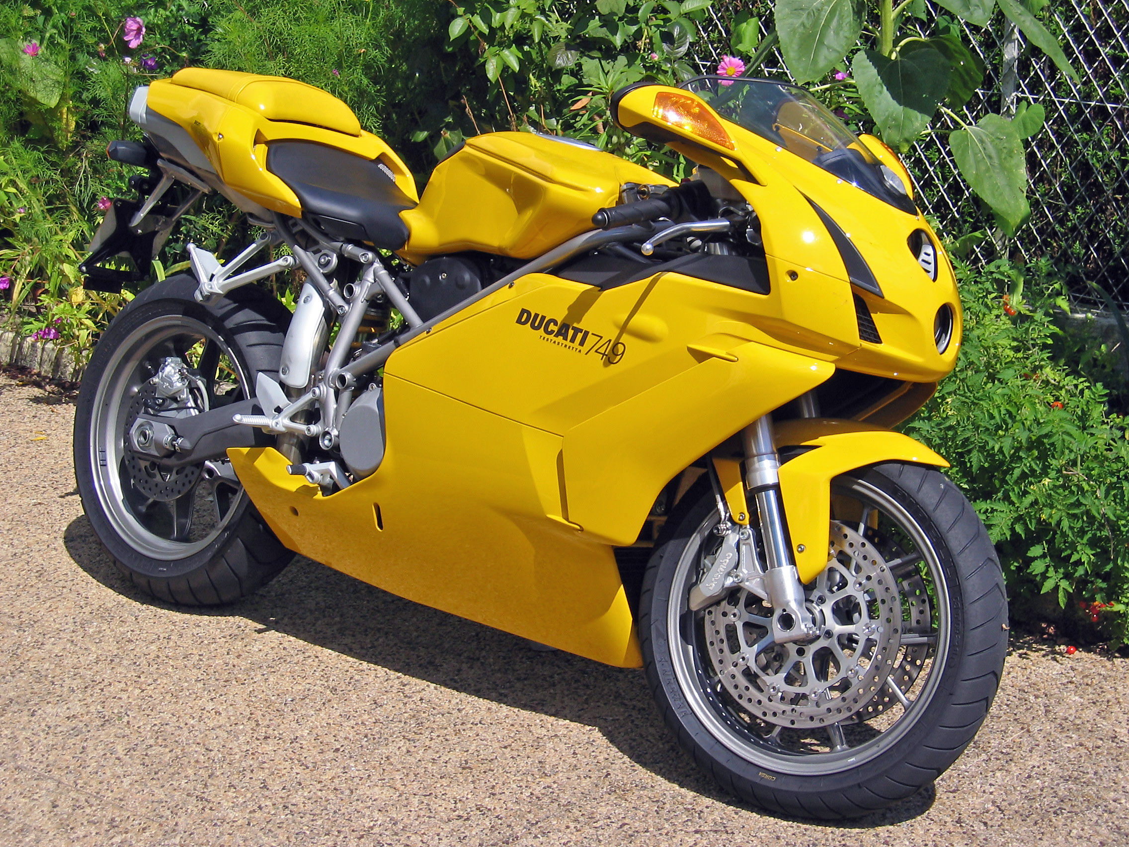 Ducati 749 Auteur : Monster1000 France, août 2004